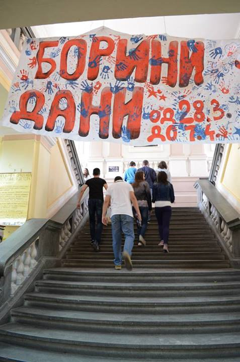 Српски (ћирилица): Слика из гимназије "Бора Станковић" током Бориних дана